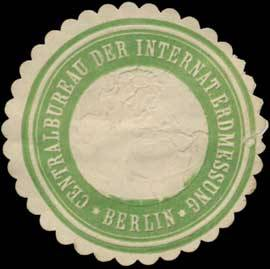 Sealing stamp Title: Centralbureau der Internat. Erdmessung (Geodäsie) Description: Vermessung, Geodäsie, grün, weiß, geprägt Place: Berlin size: 4 cm